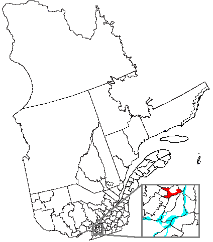 Volapük: Topam in provin: Québec.